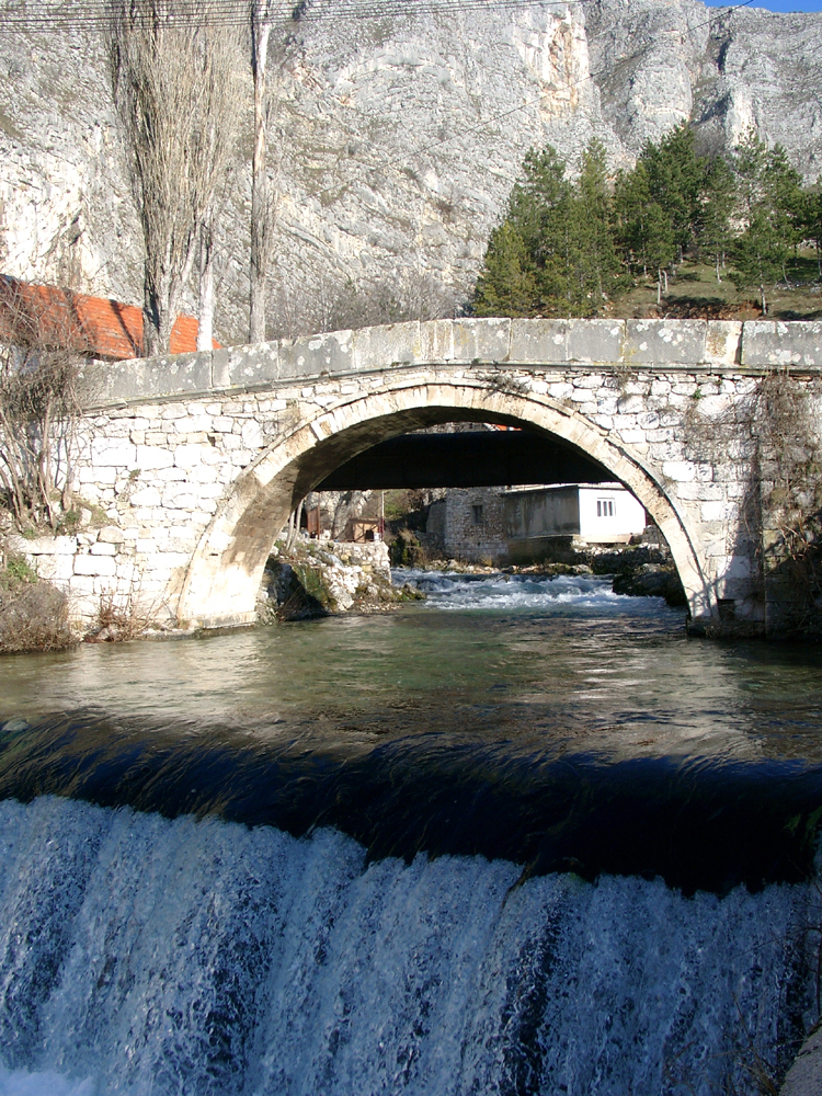 Stari Most u Livnu.